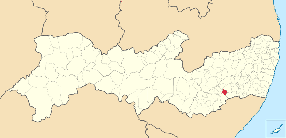 Mapa de Jurema (2)